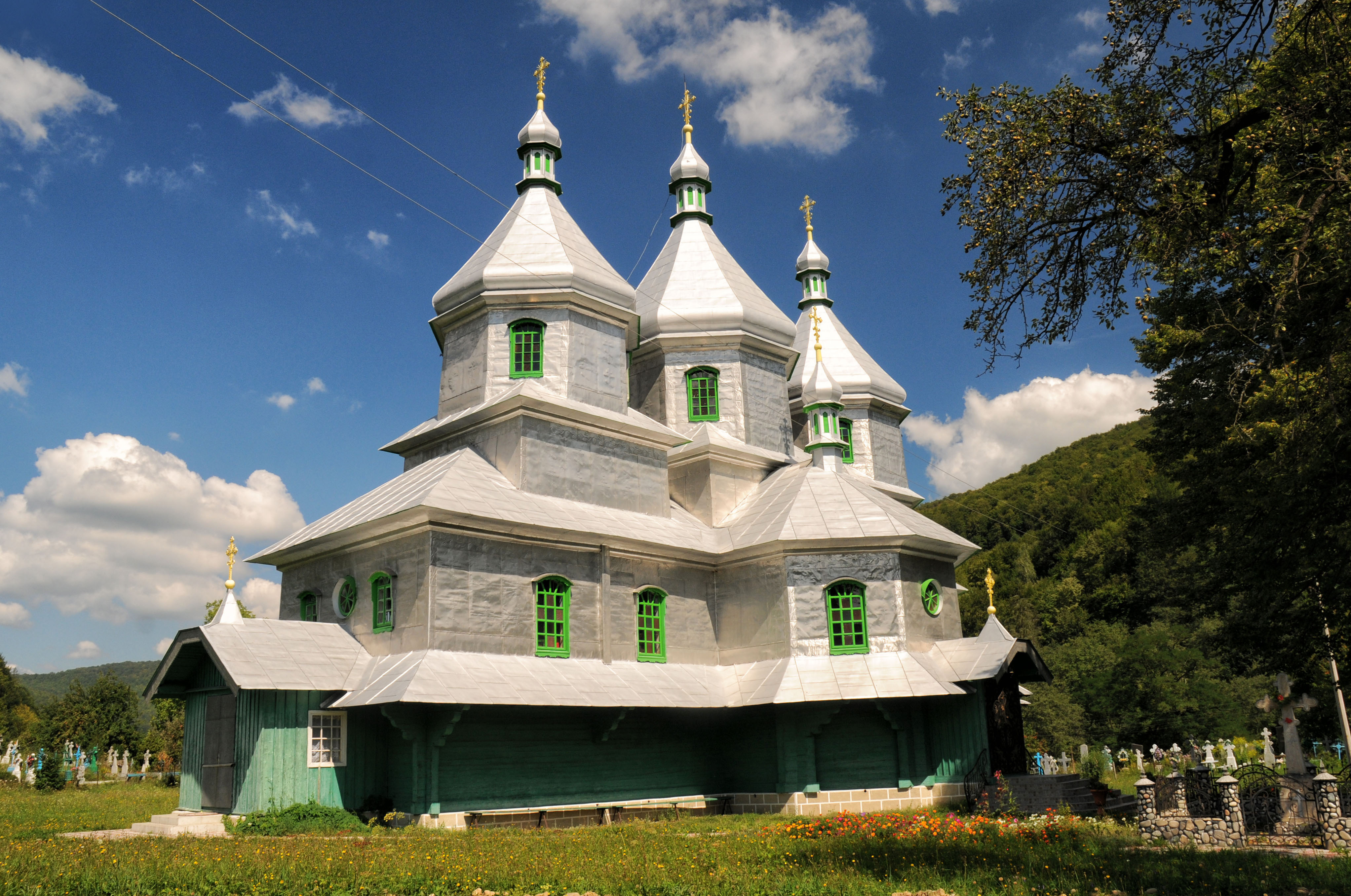 Виженка, Миколаївська церква